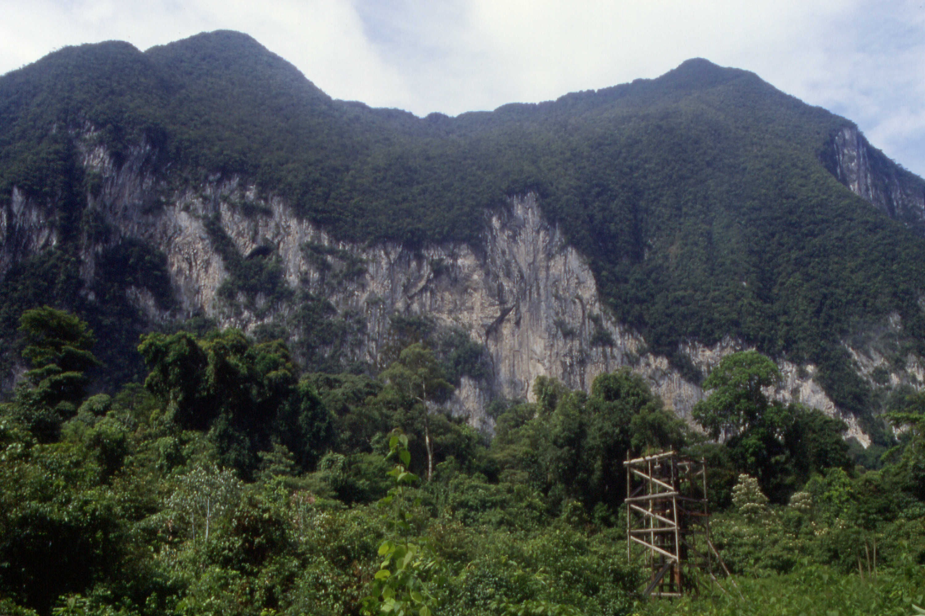 Gunung-Mulu-Nationalpark